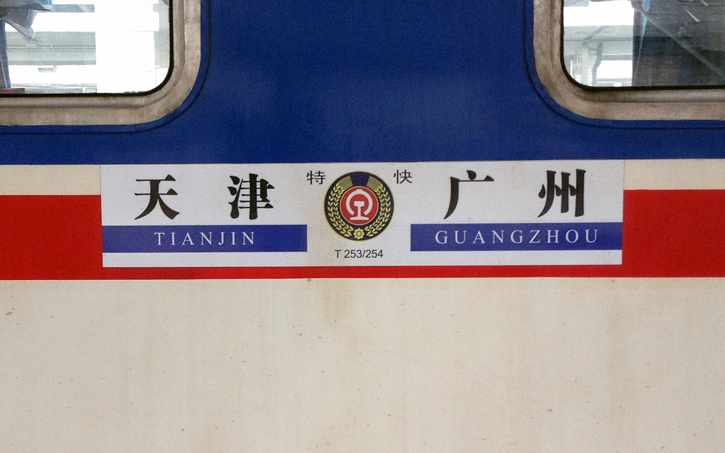 天津-广州T253/254次列车水牌